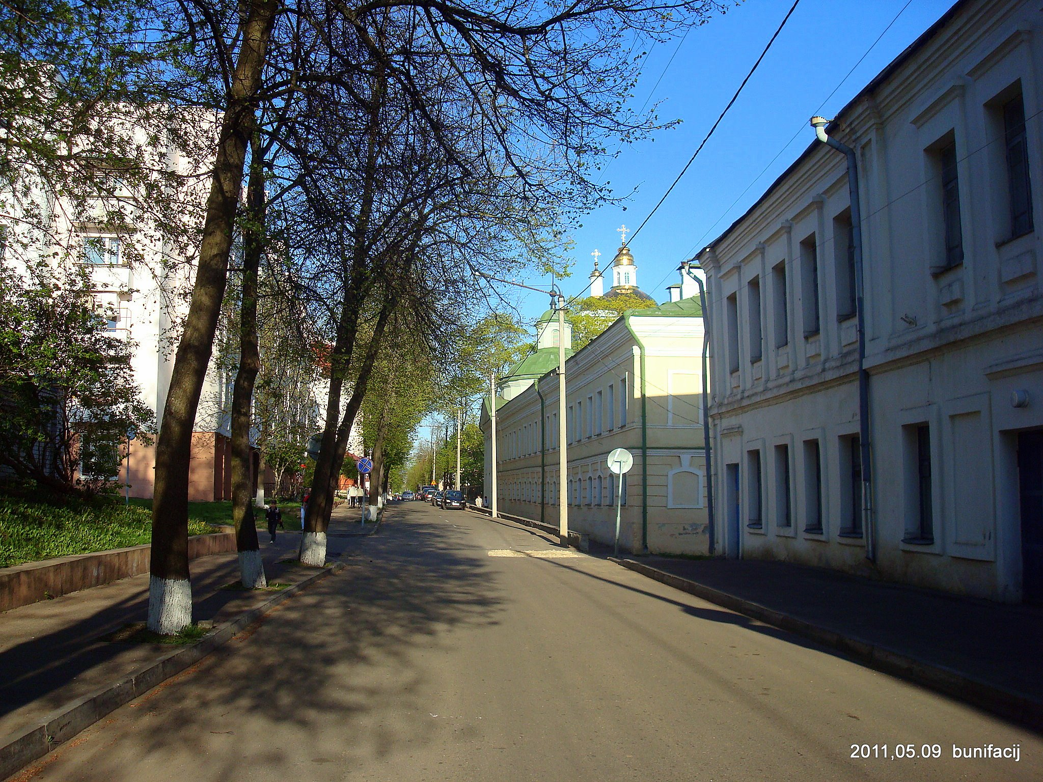 ул.Нижне Покровская